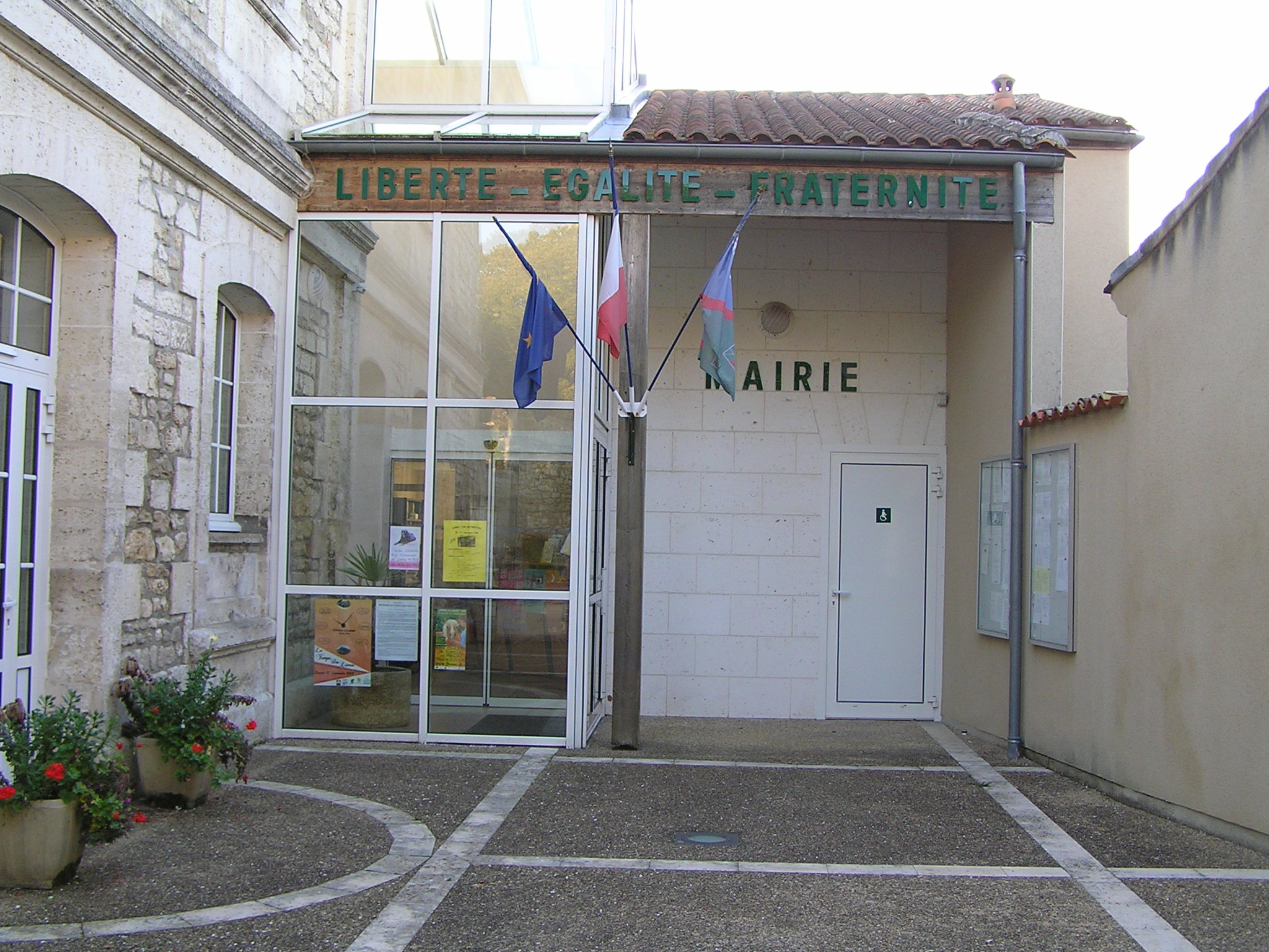 mairie de Garat (Charente)